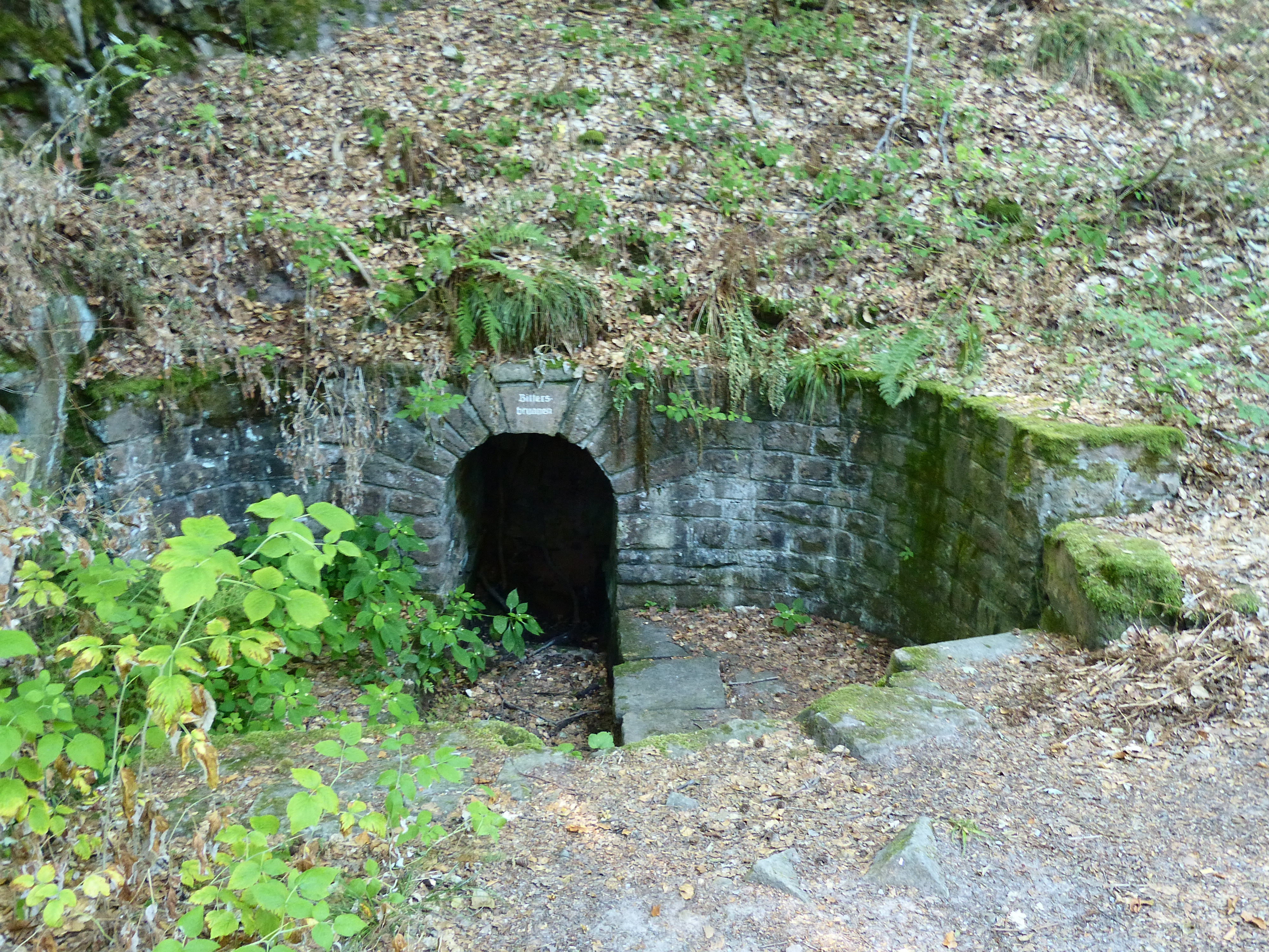 Der Bittersbrunnen liegt am Heiligenberg unterhalb der St. Michaels Kloster.Zuerreichen ist er über den "Unterer Bittersbrunnen Weg". (Wegmarkierung 1 )